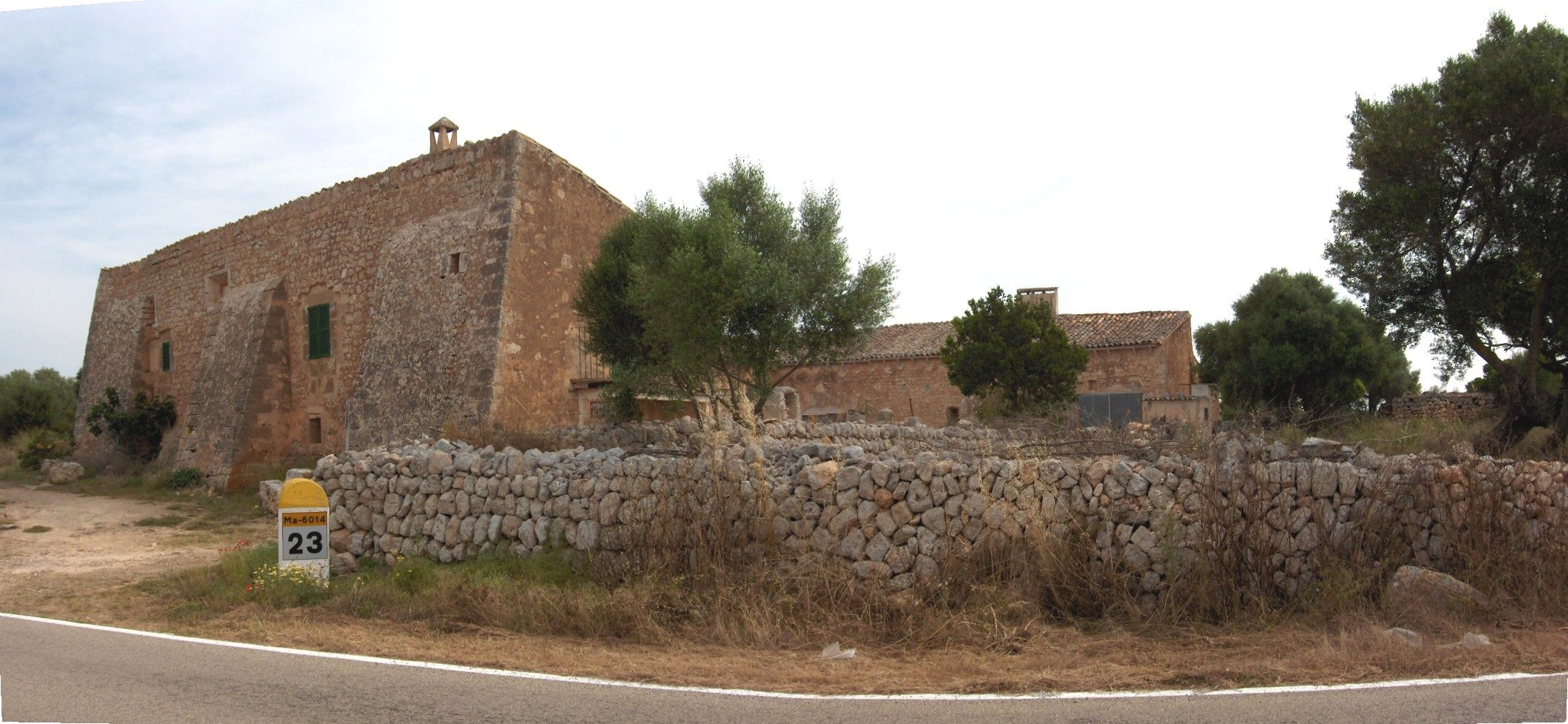 Cases de la possessió de Capocorb Vell, a la marina de Llucmajor, Mallorca.